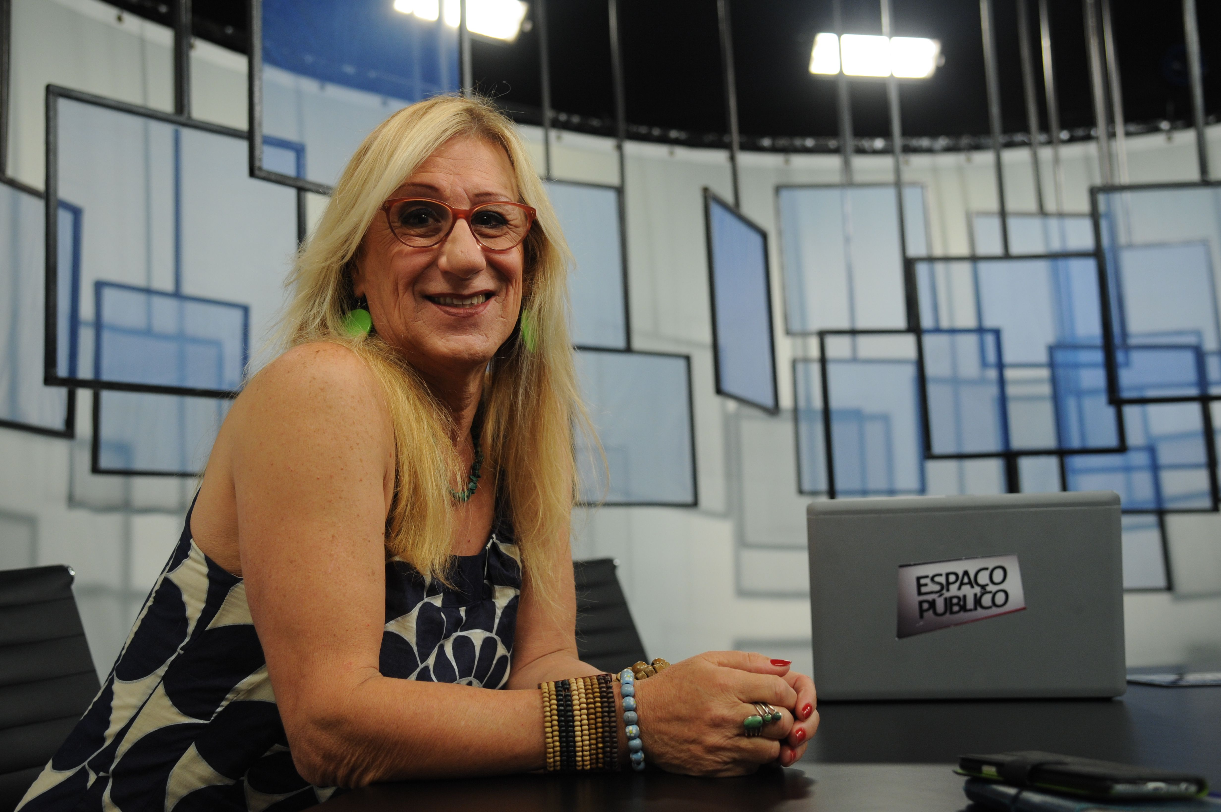 Laerte Coutinho no Programa Espaço Público.